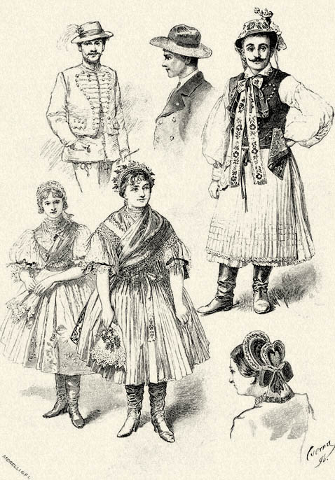 Nógrádmegyei palócok Karancsalja tájáról.